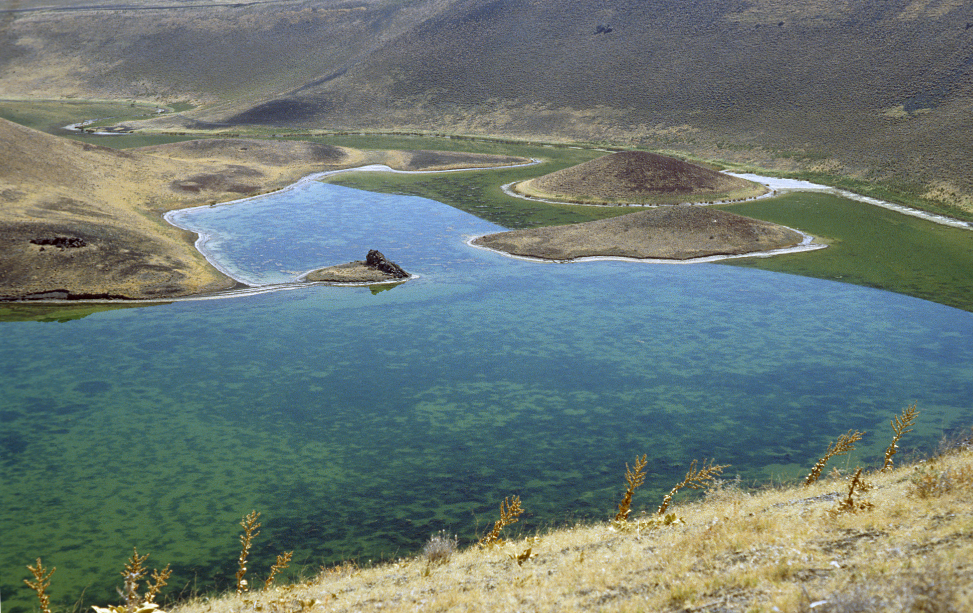 Meke Gölü & Kratersee nahe Karapınar — Provinz Konya, Türkei.